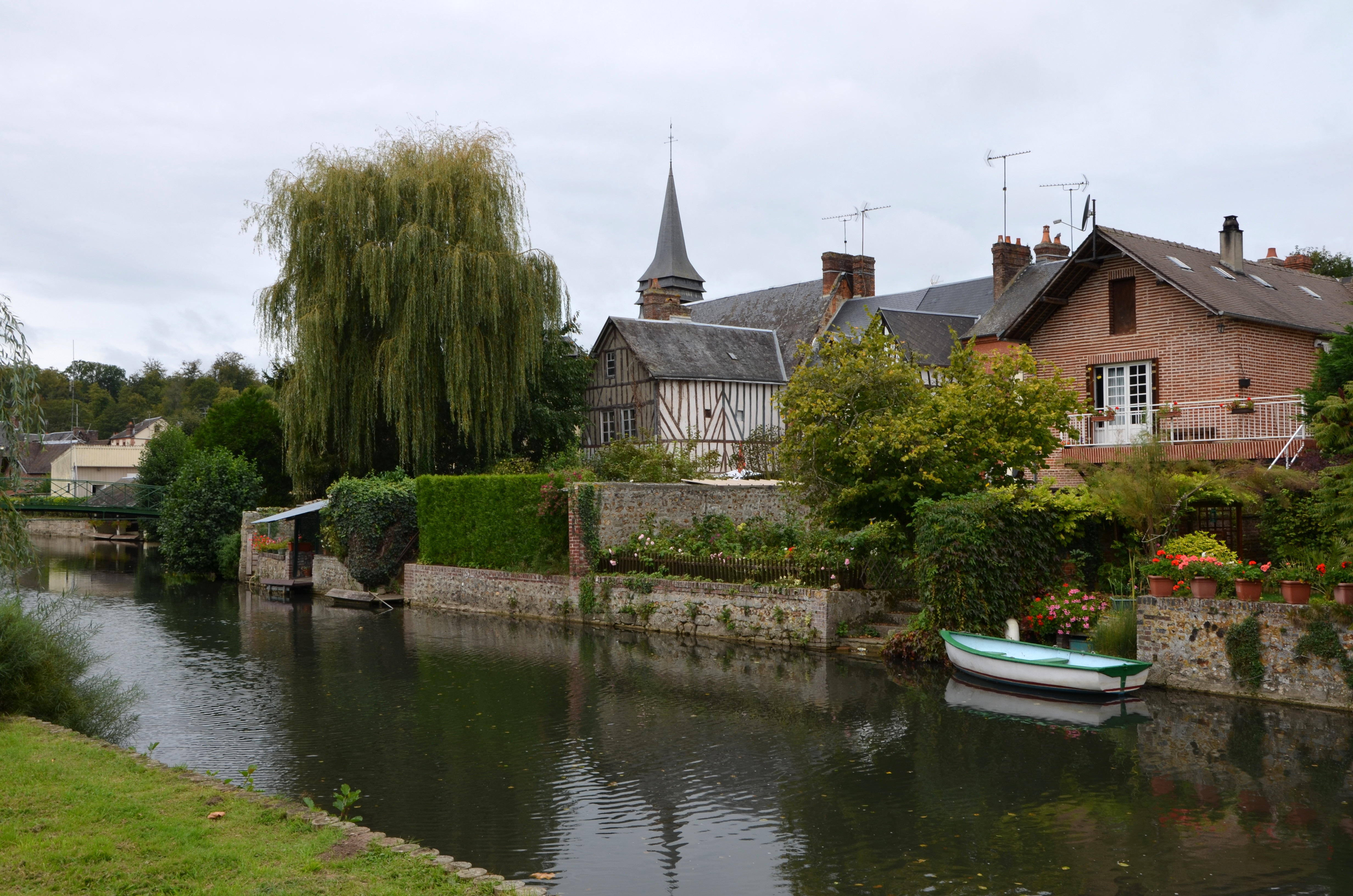 La Charentonne à Broglie, Eure, France.